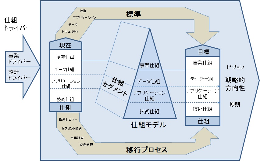 米連邦仕組フレームワークの概念図であり、英語の原図を元に雁太郎が英語部分を日本語化した。